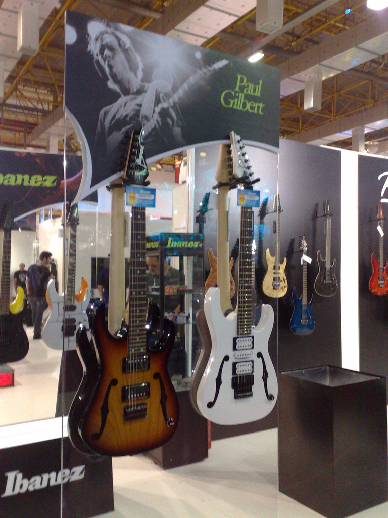 Expomusic 2010 Ibanez PGM - Paul Gilbert Series